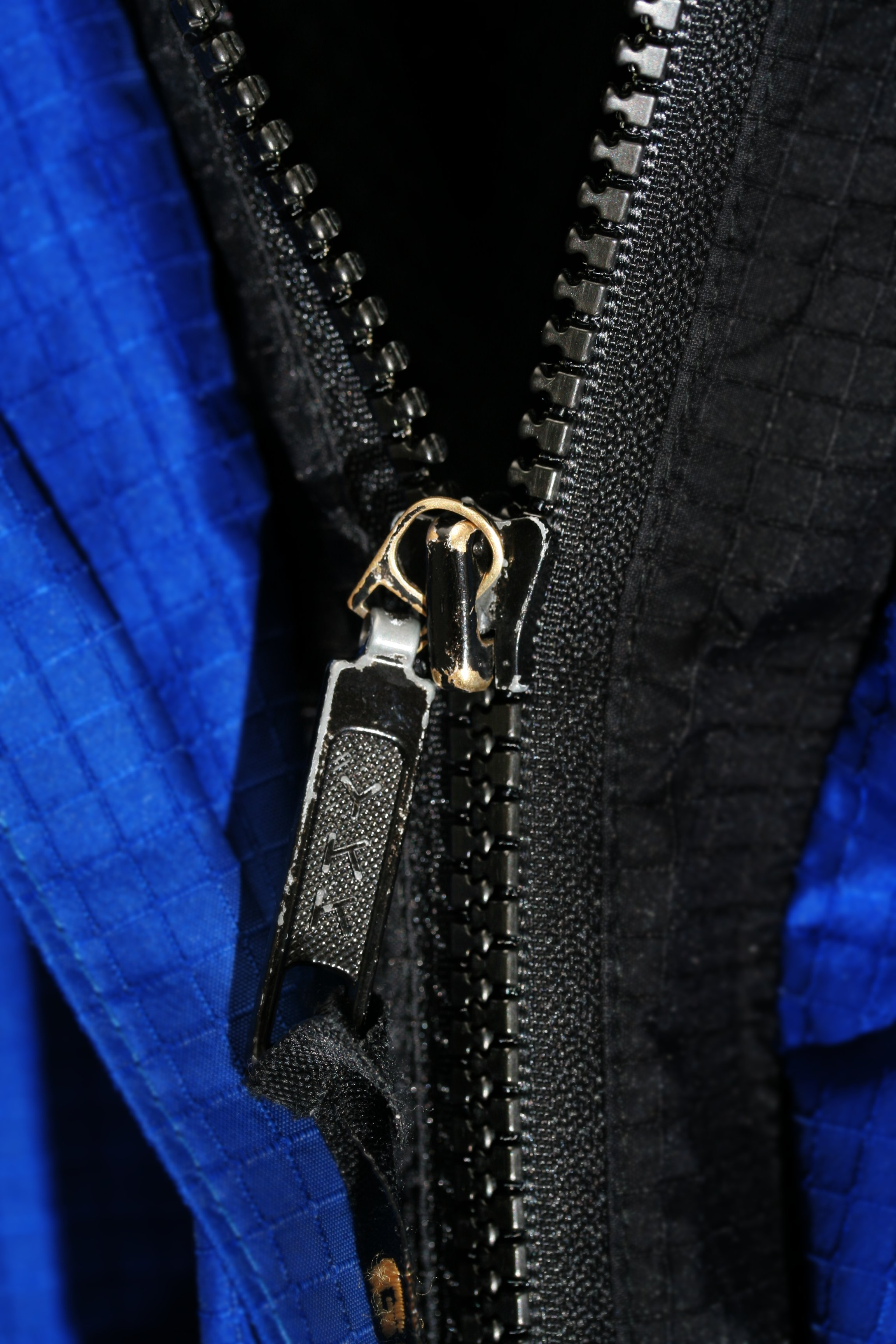 Zipper